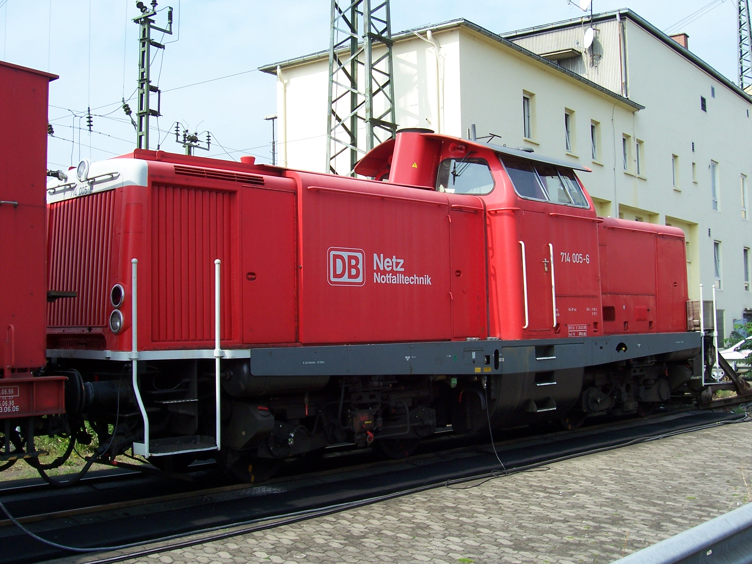 Diesellokomotive Baureihe 714 005-6 am Tunnelrettungszug in Mannheim